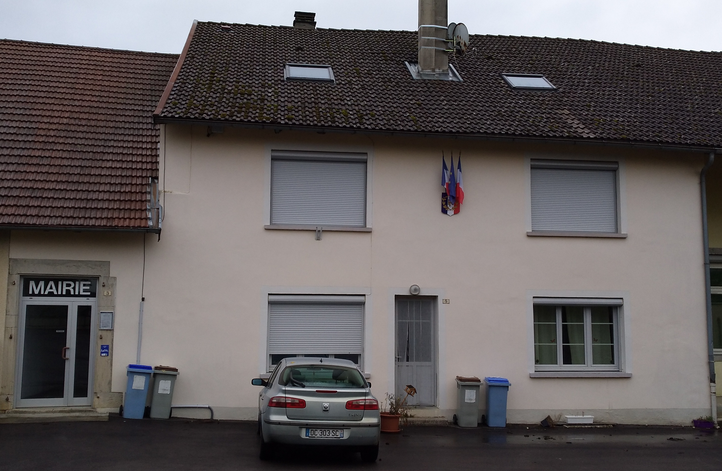 Mairie de Chavéria (Jura, France).